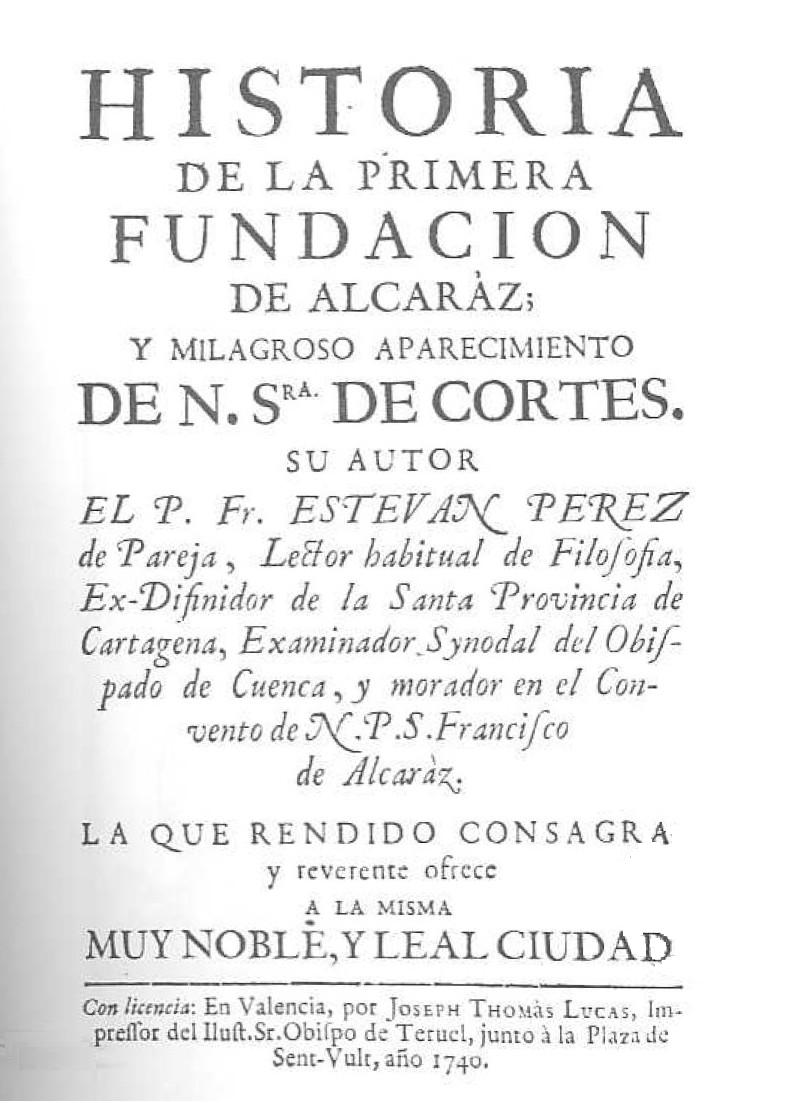 Edición de la Obra "Fundación de la ciudad de Alcaraz y de la Milagrosa Aparición de Ntra. Sra. de Cortes.